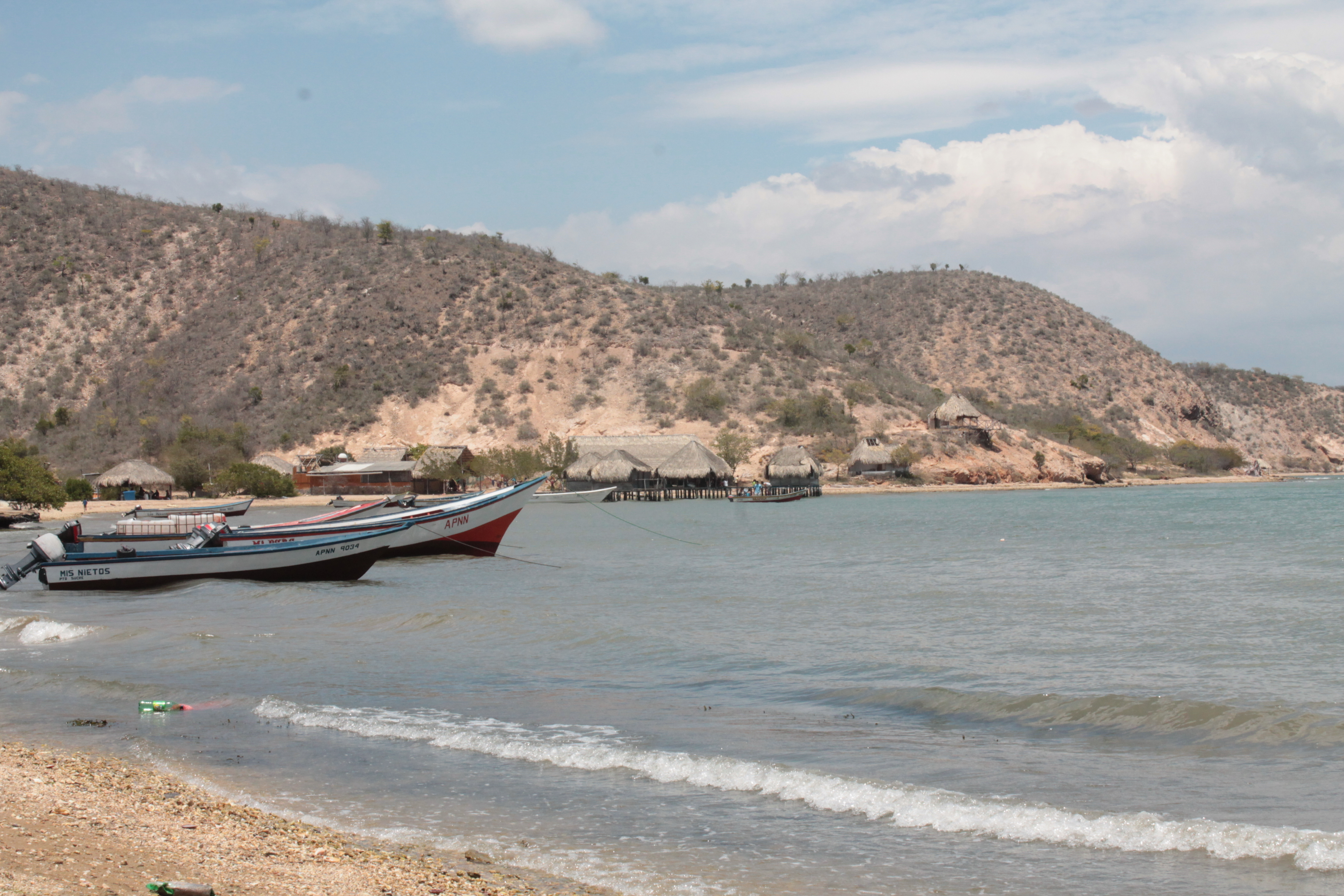 Chacopatica, Estado Sucre, Venezuela